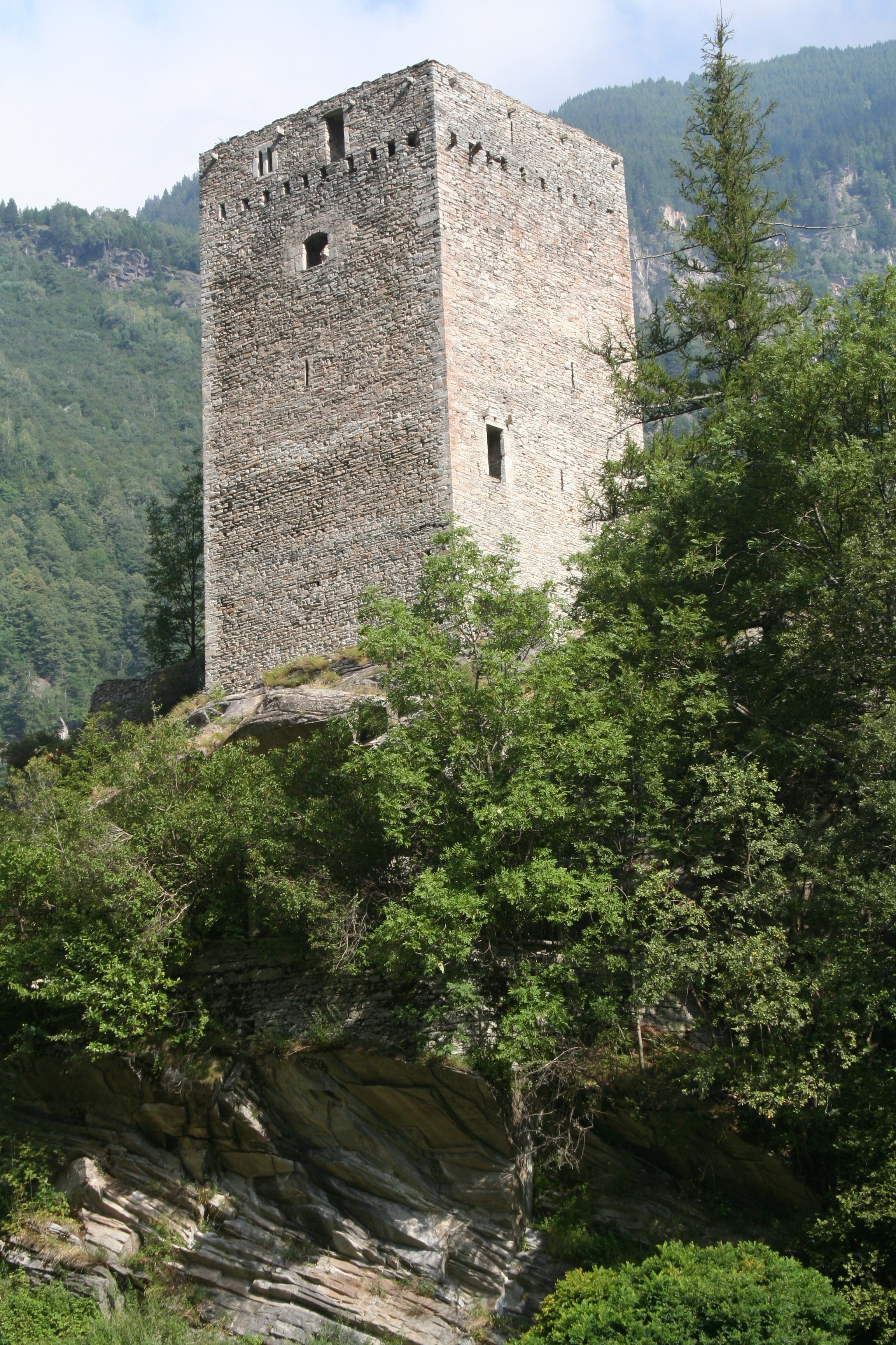 Castelmur: Turm von SE